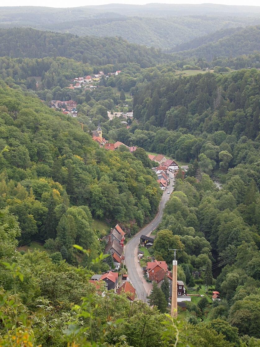 Altenbrak (Landkreis Harz; Sachsen-Anhalt), Blick auf Altenbrak vom Aussichtspunkt "Schöneburg"